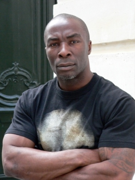 MC Jean Gab'1 en 2013.